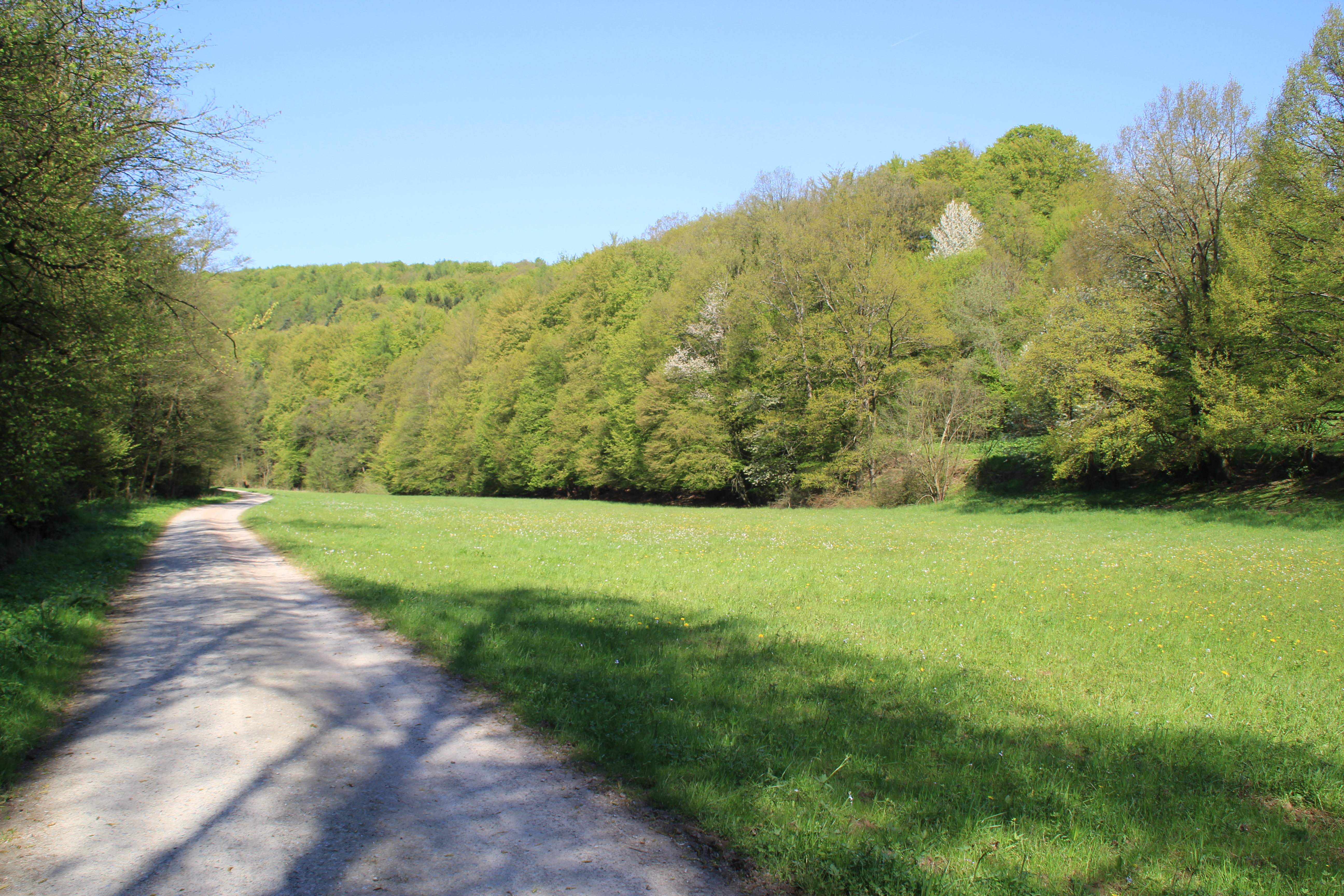 Das Tal des Omersbaches bei Omersbach in Bayern